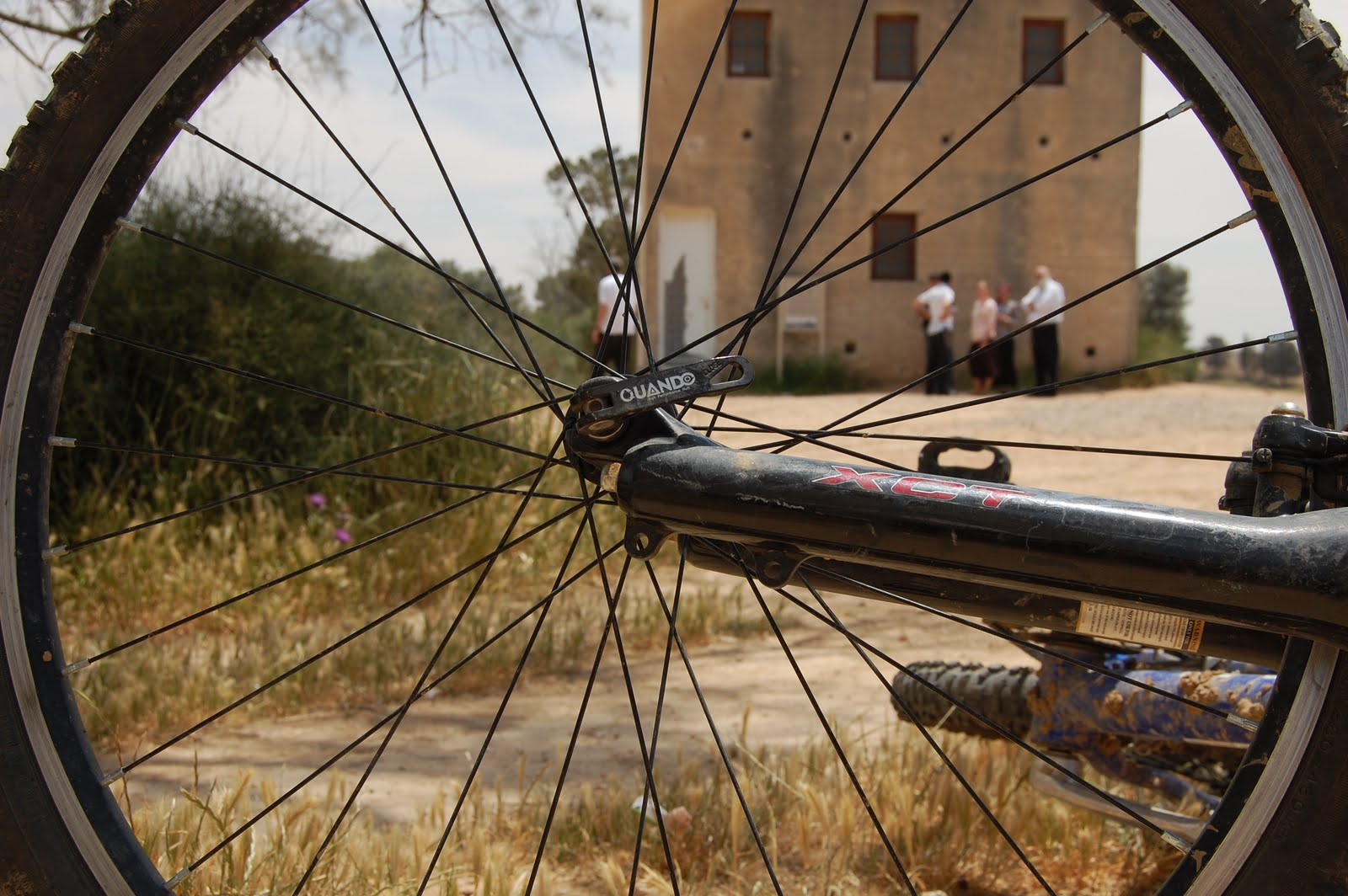 גלגל אופניים